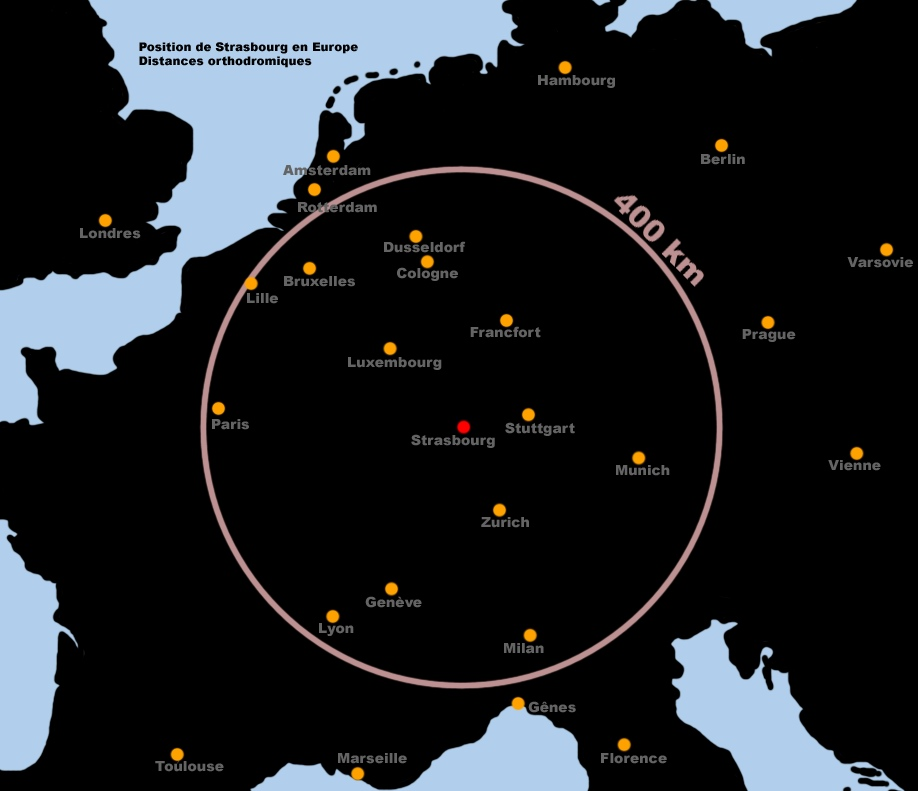 Strasbourg par rapports aux grandes villes d'Europe (distances orthodromiques)